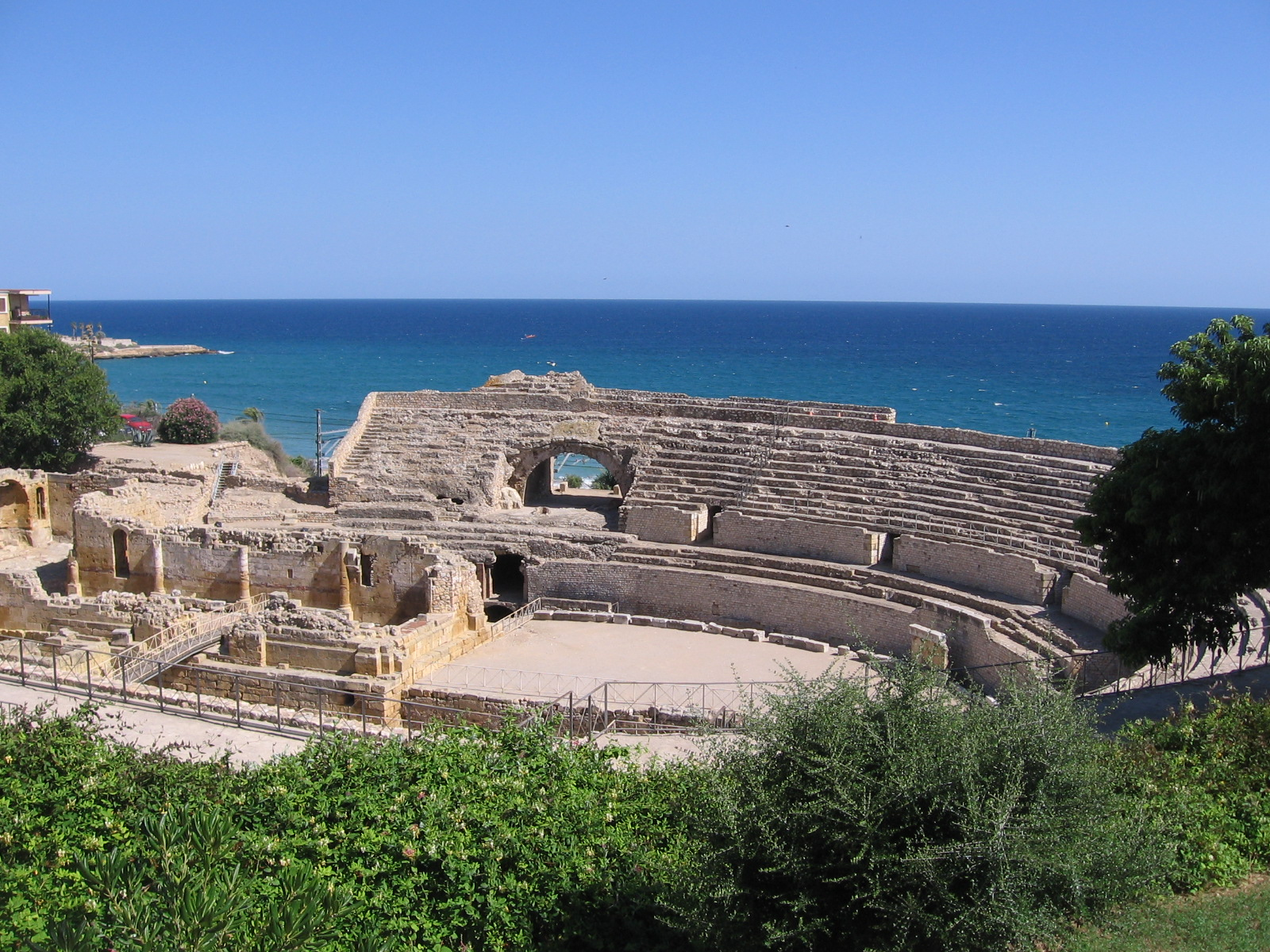 Amphithéâtre romain de Tarragone datant du IIème siècle, construit sous le règne de Hadrien